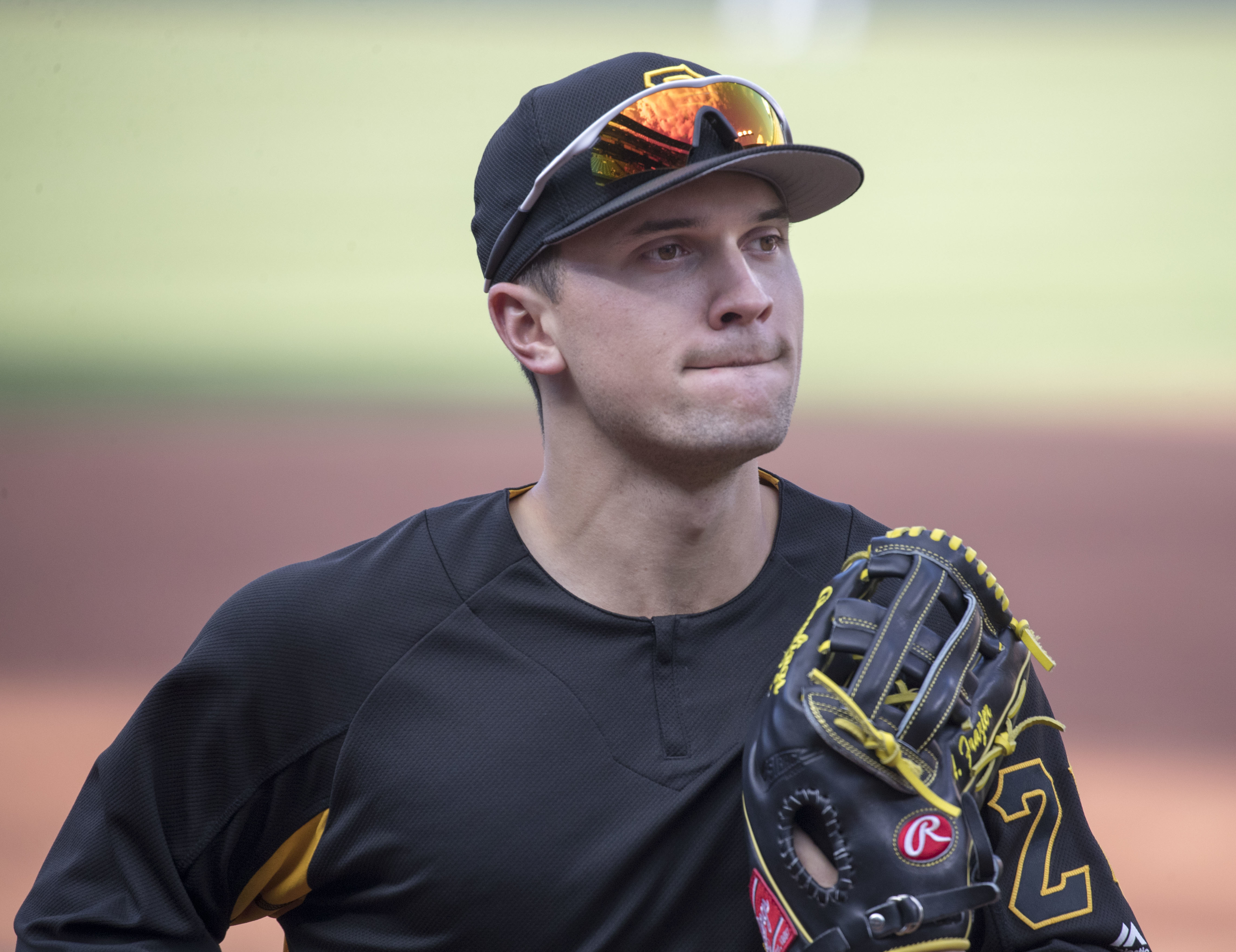 Pirates at Orioles 6/6/17